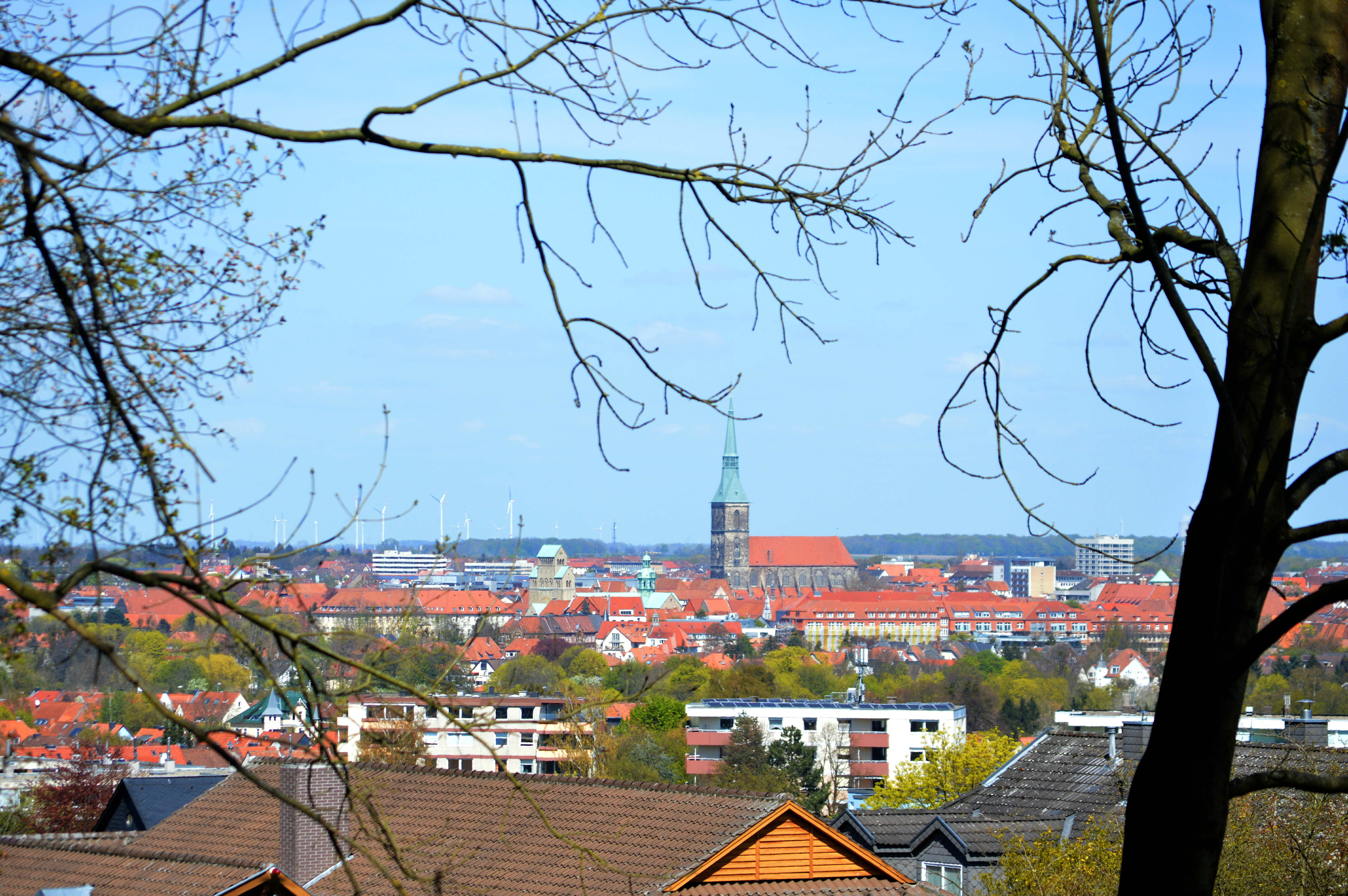 Landschaftsschutzgebiet Steinberg - Blick auf Hildesheim (5)